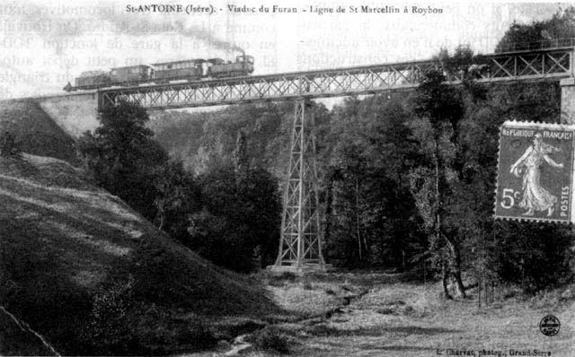 mise en charge